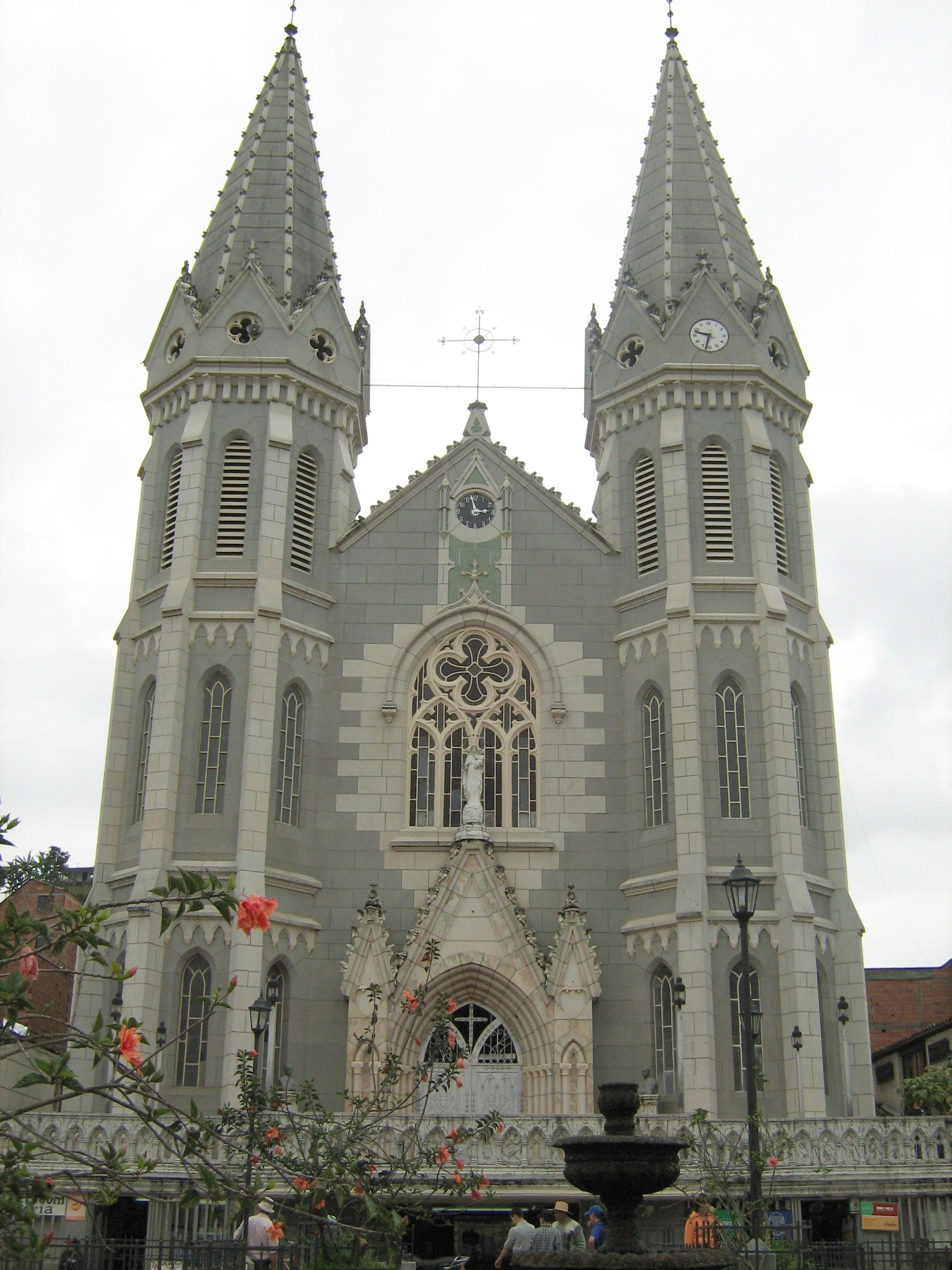 Iglesia de Nuestra Señora del Rosario del municipio de Donmatías, Antioquia, Colombia